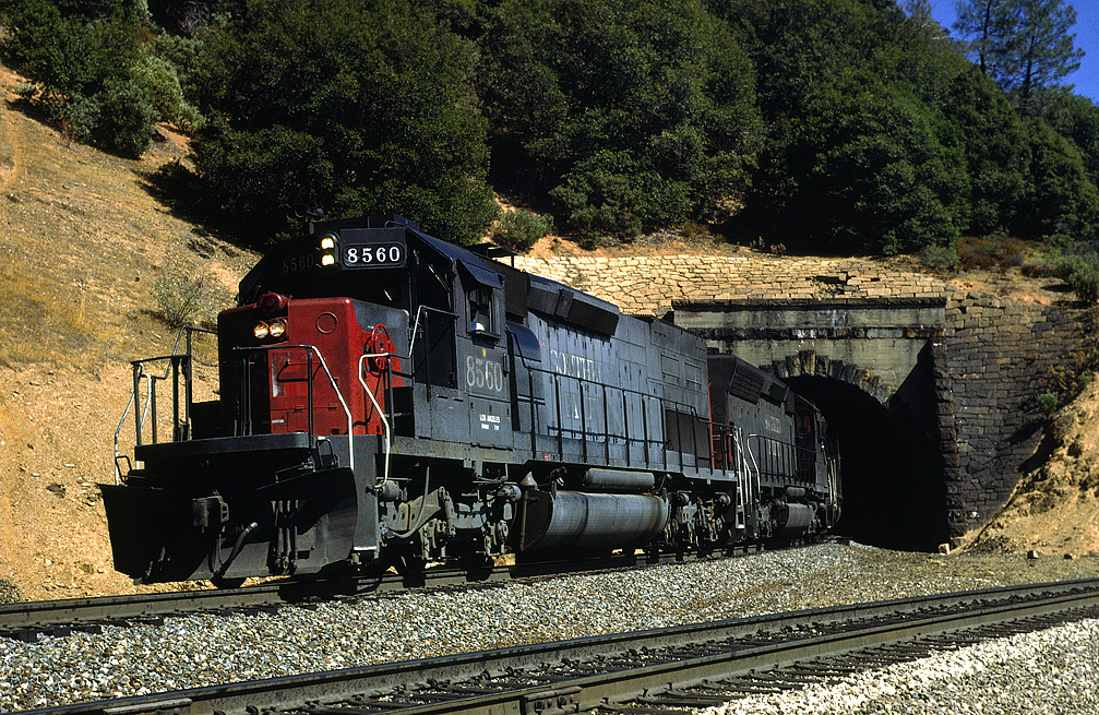 SP 8560 Tunnel 33 Aug1987xRP